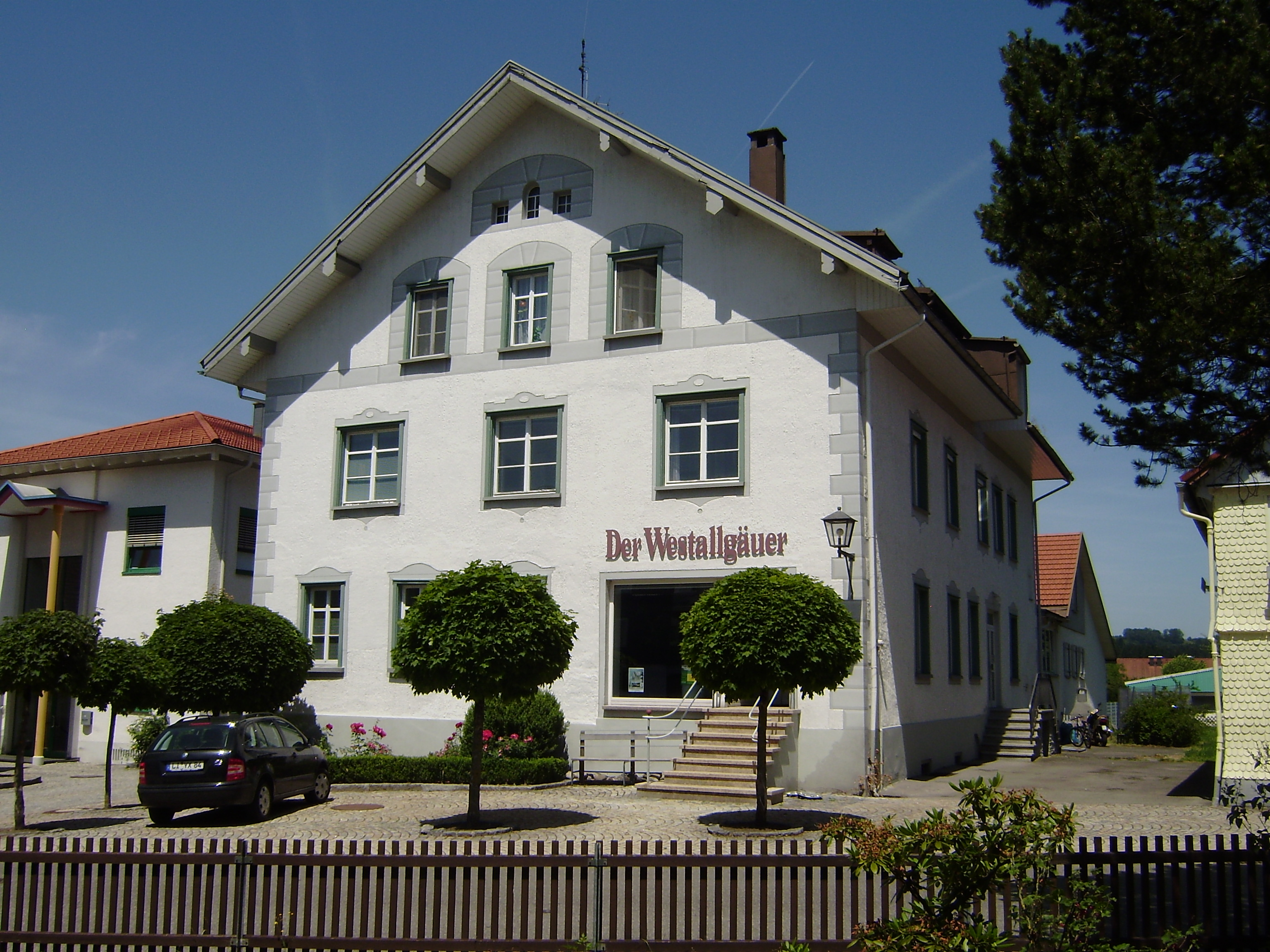 Haus Embacher, erste Sennerei und Lehranstalt, Fabrik, heute Redaktion Westallgäuer in Weiler im Allgäu, Bayern, Deutschland